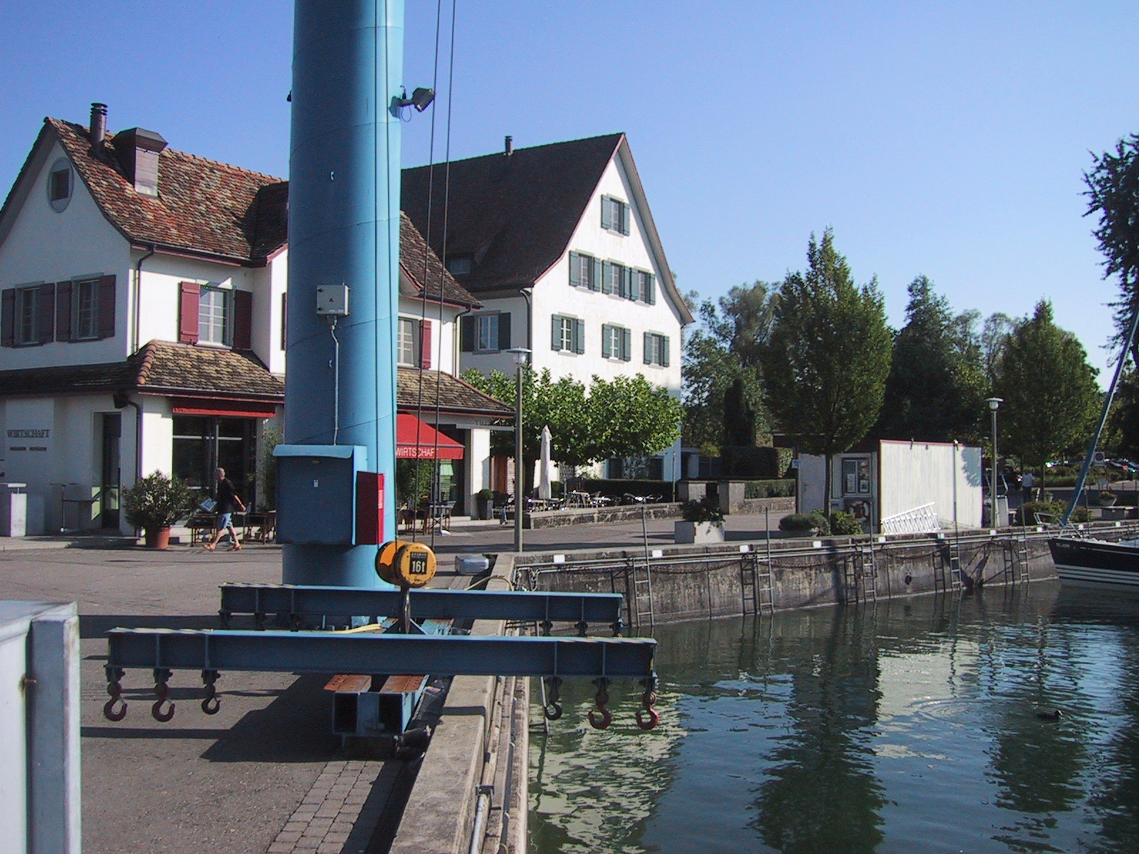 Aufnahme 30. August 2005, Hafen Bottighofen, Kanton Thurgau. Fotograf Peter Berger (selbst fotografiert). Lizenzstatus "GNU-FDL"